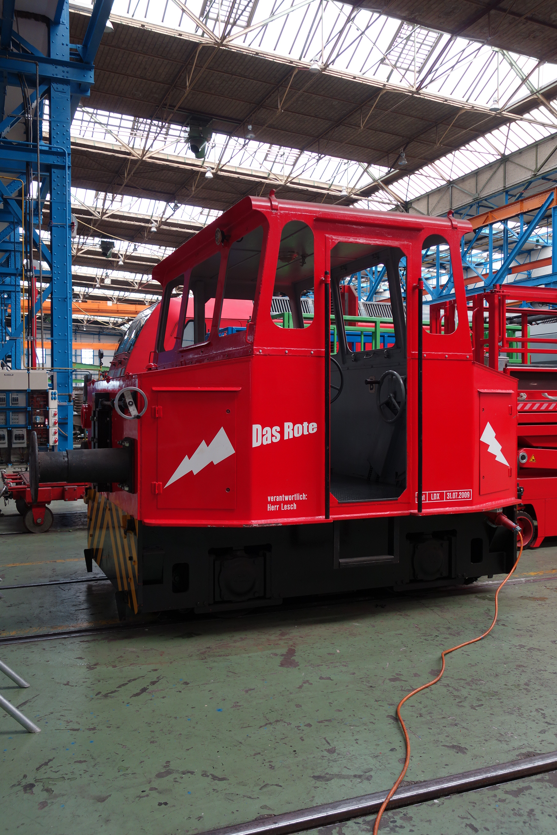 DB Fahrzeuginstandhaltung Werk Dessau, Tag der offenen Tür, Werkshalle mit Akku-Schleppfahrzeug "Das Rote"